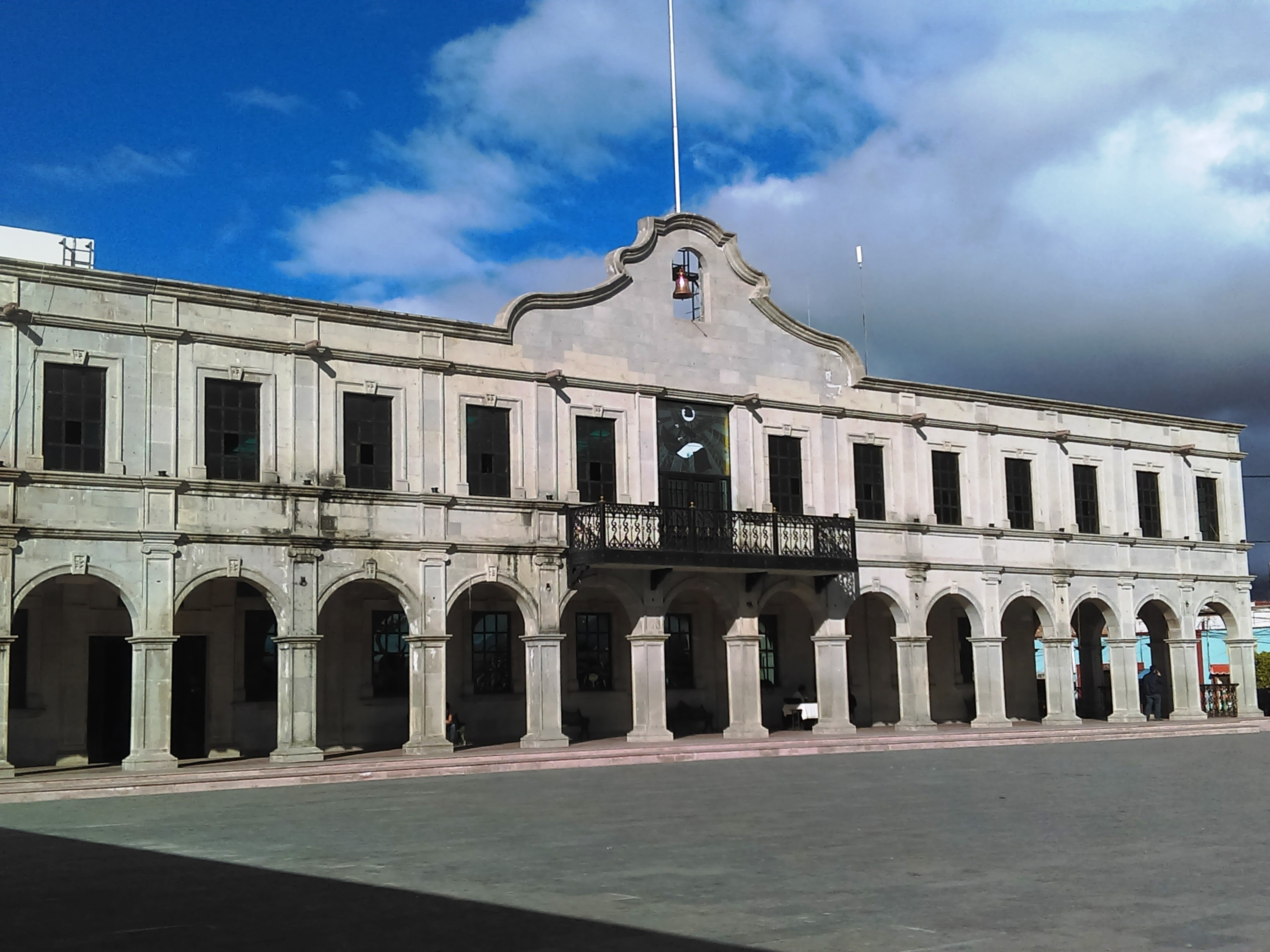 Municipal Palace of Actopan, Hidalgo